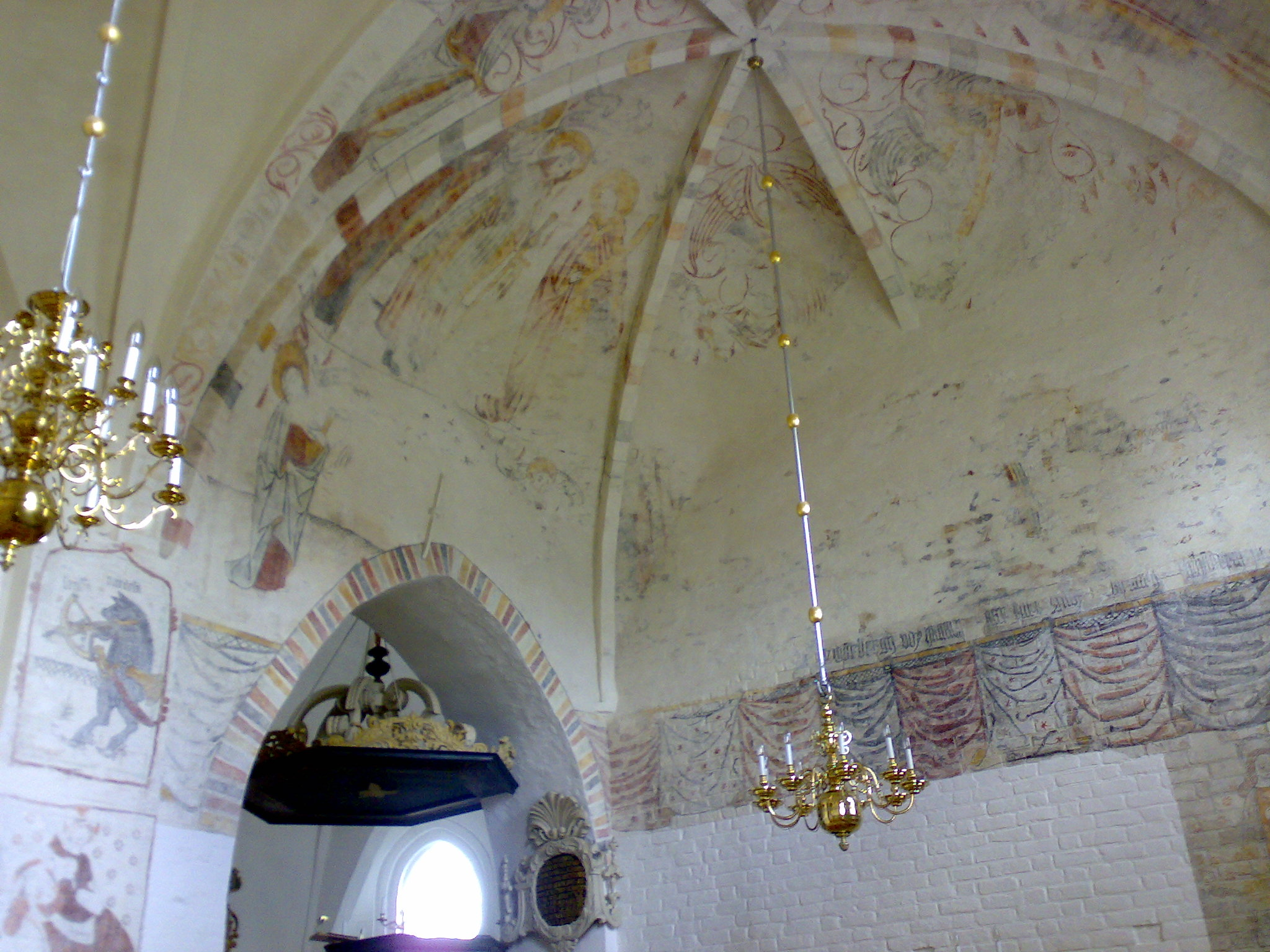 Fresco, Nibe Church, Denmark